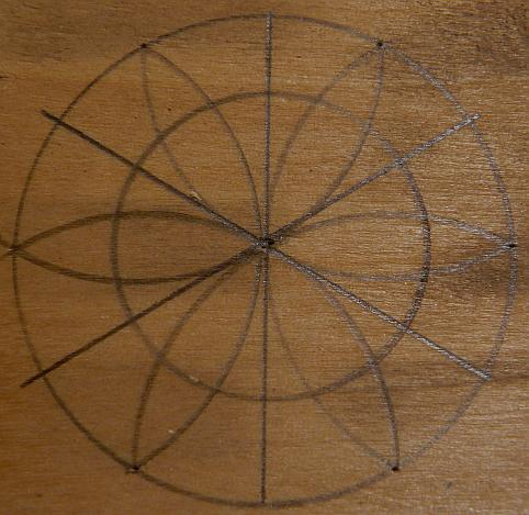 Vorlage Kerbschnitt